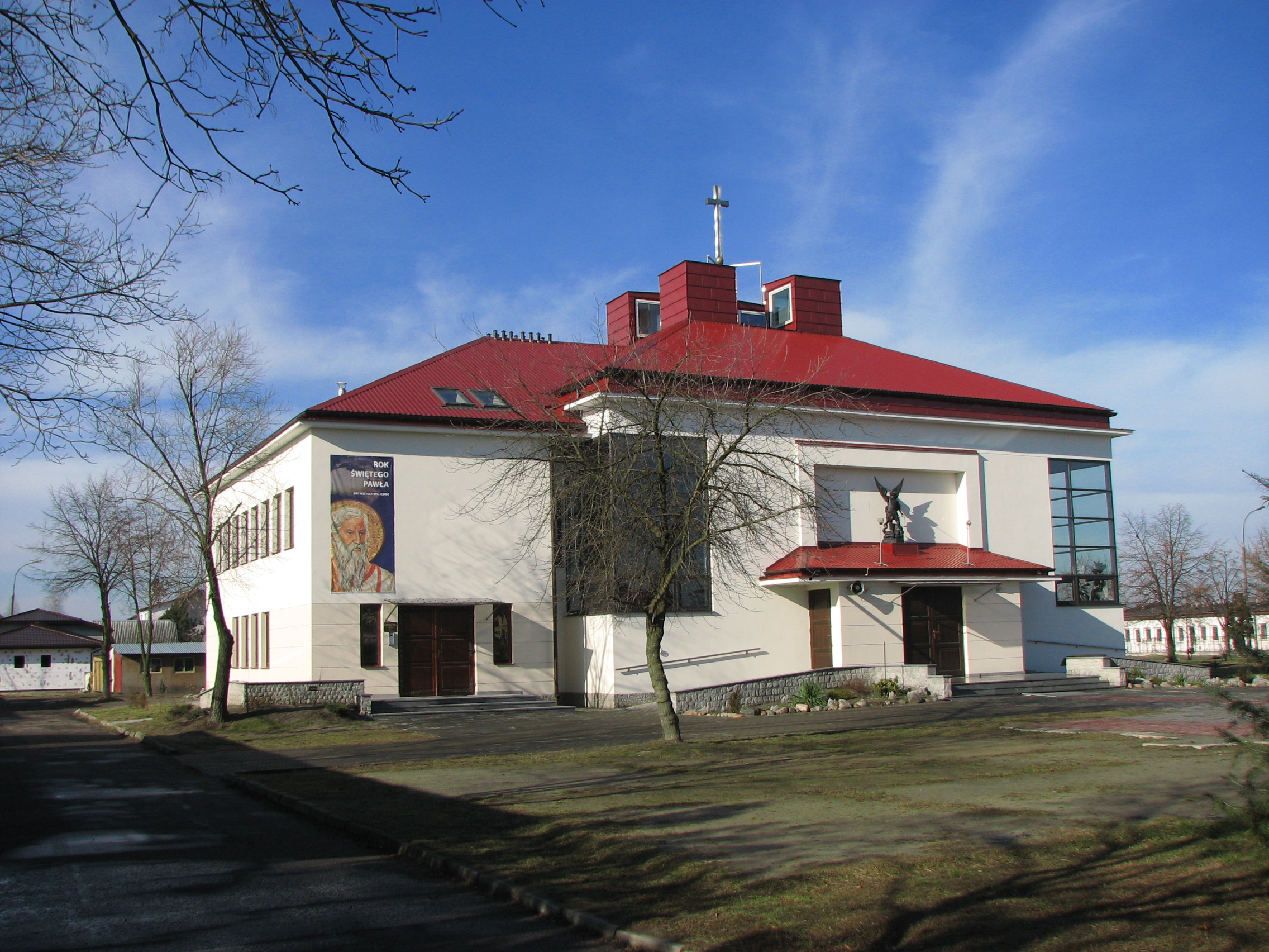 Kościół rzymskokatolicki pod wezwaniem Michała Archanioła w Białej Podlaskiej.